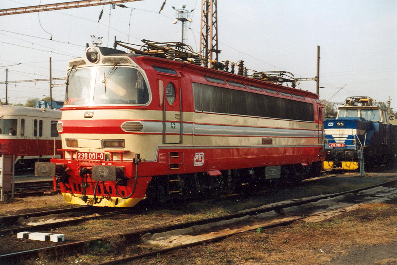 BR 230.001 auf einer Ausstellung in Usti nad Labem